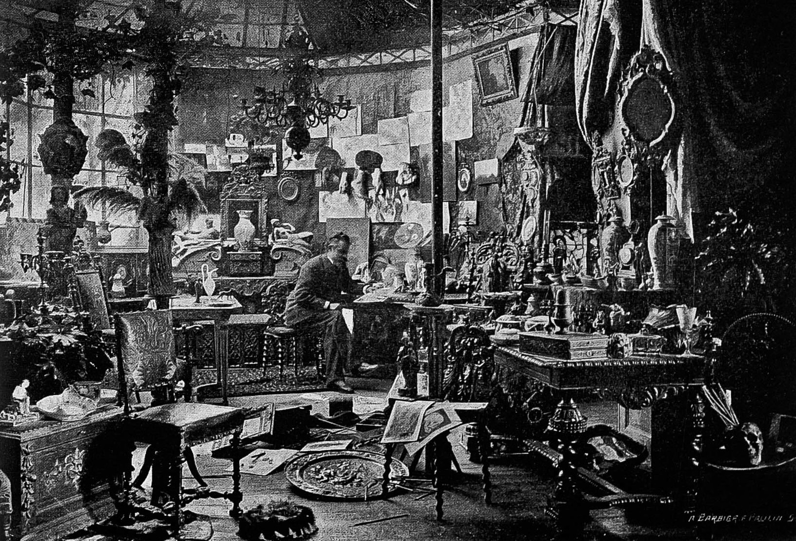 Extrait de La Lorraine artiste du jeudi 1er août et jeudi 15 août 1901, fascicule n° 15-16